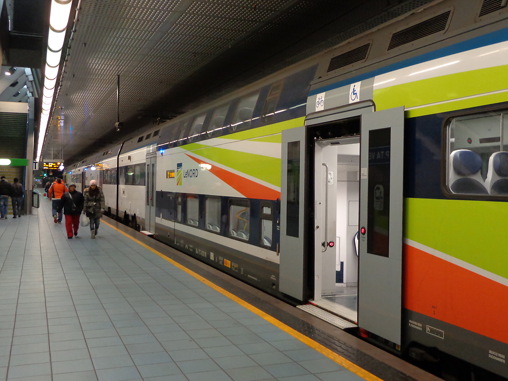 Stazione ferroviaria di Milano Porta Venezia. È in sosta un elettrotreno tipo TSR che effettua un treno del servizio ferroviario suburbano di Milano.